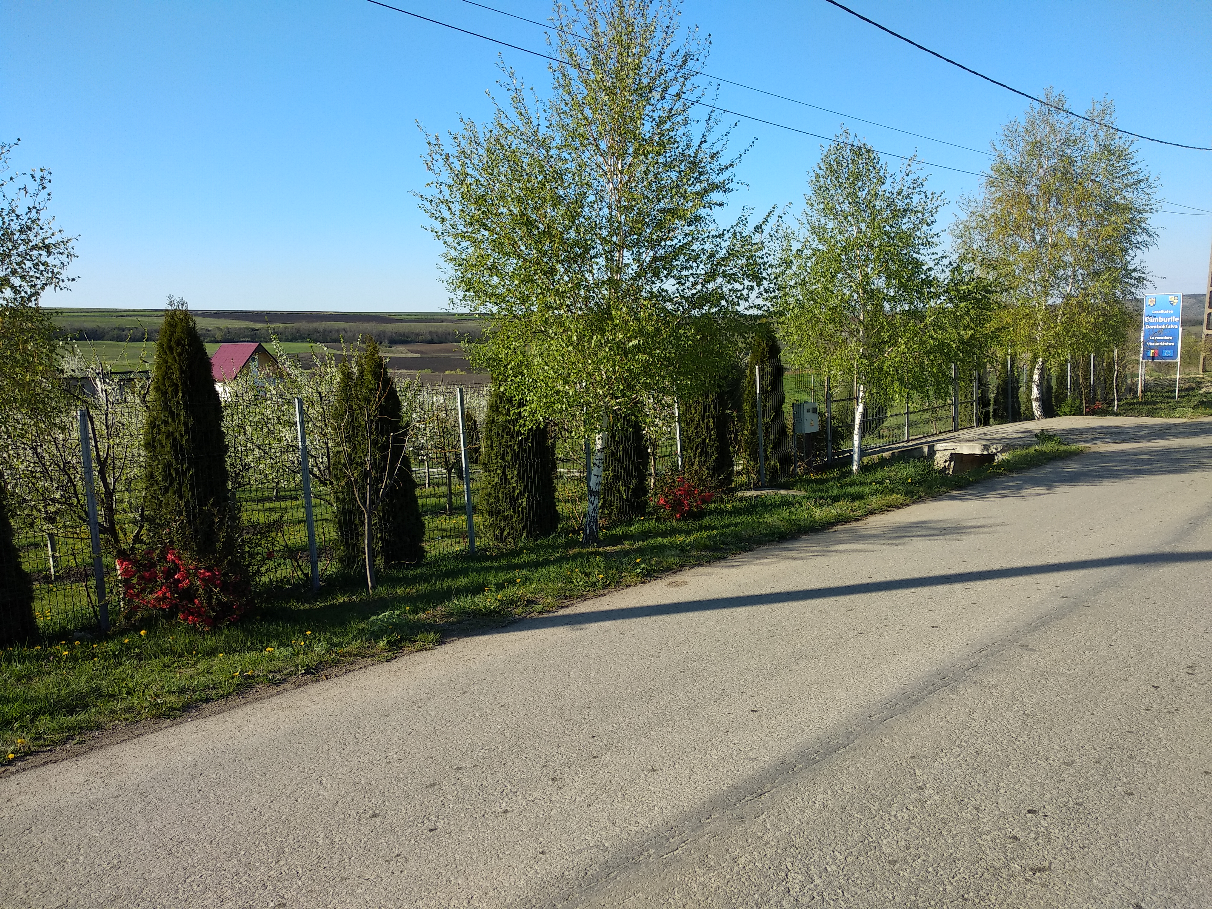 hause